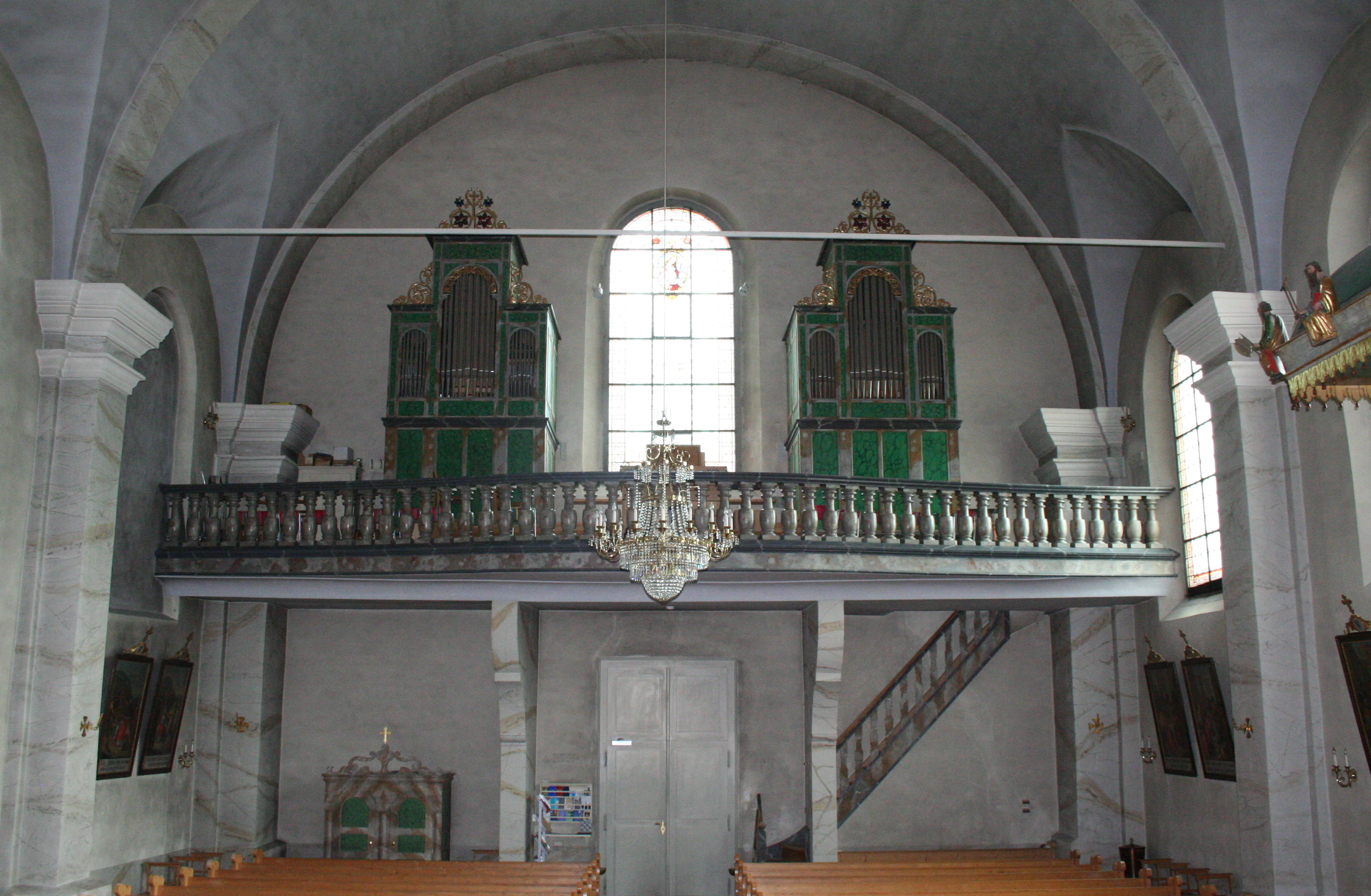 Antoniuskirche Lantsch/Lenz Empore